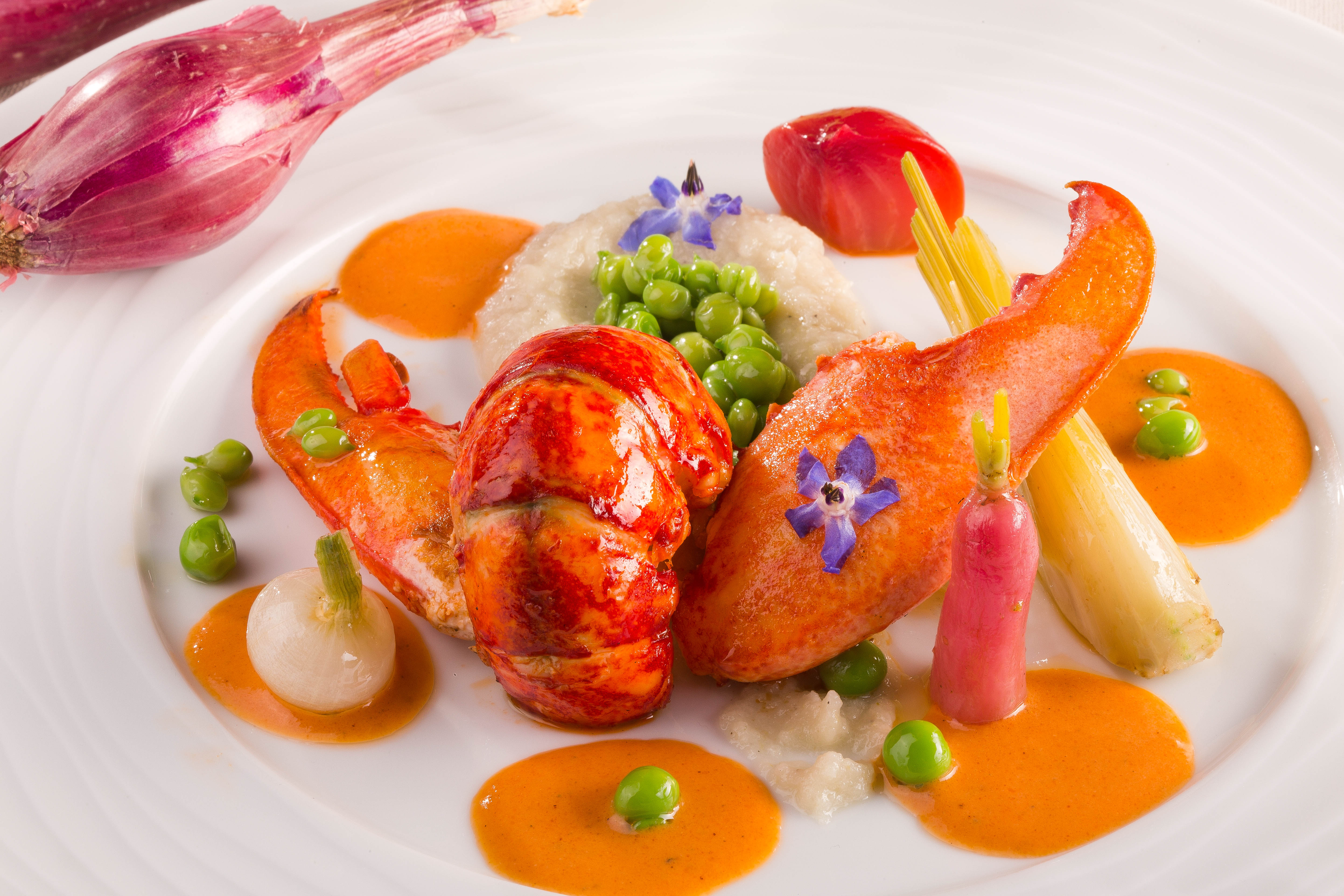 Homard bleu rôti à la coriandre et tomate émulsionnée